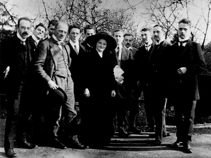 Кръгът феноменолози в Гьотинген: Райнах, Липс, Шелер, Койре, Херинг и др.